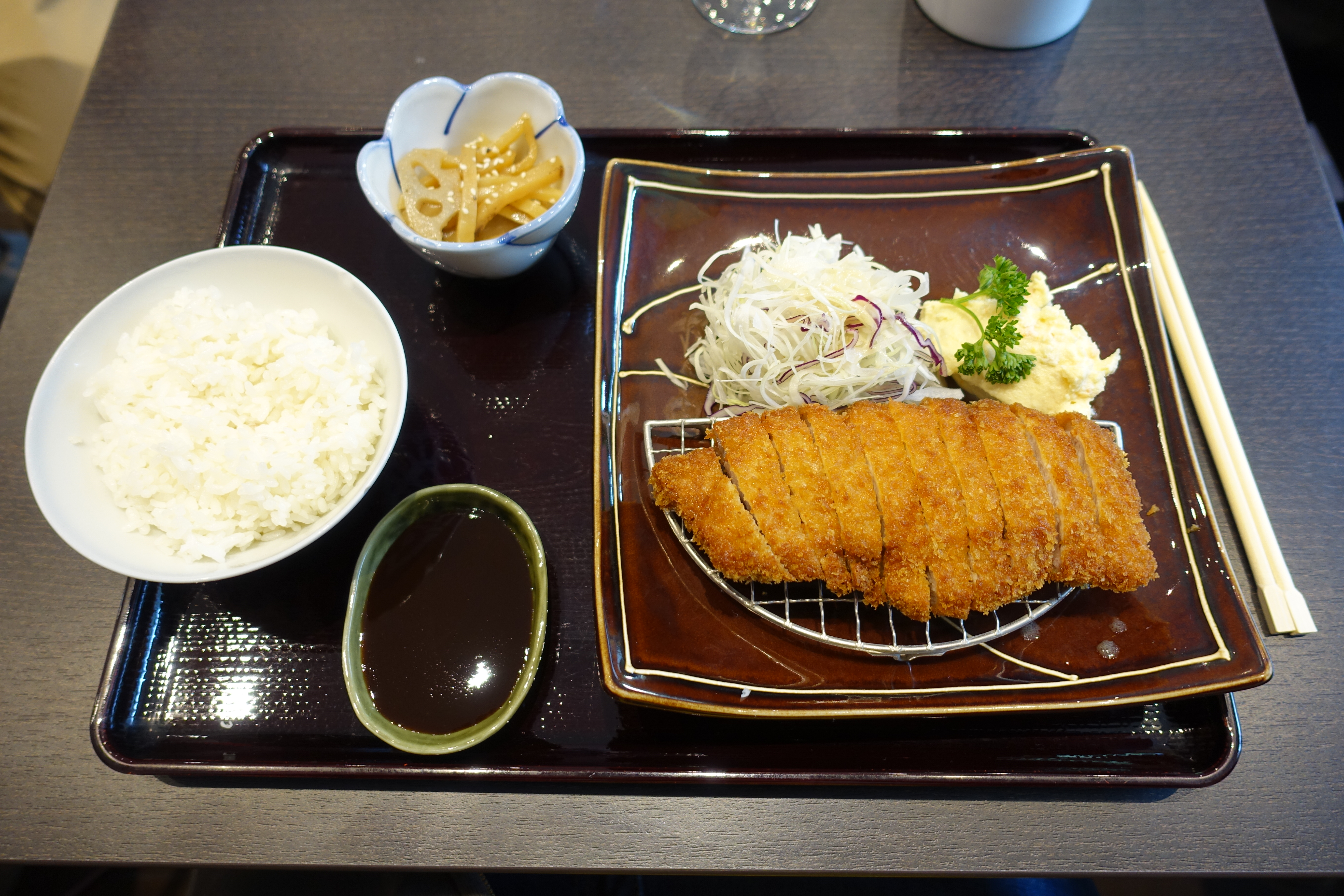 Tonkatsu Menu @ Tonkatsu Tombo @ Montparnasse @ Paris